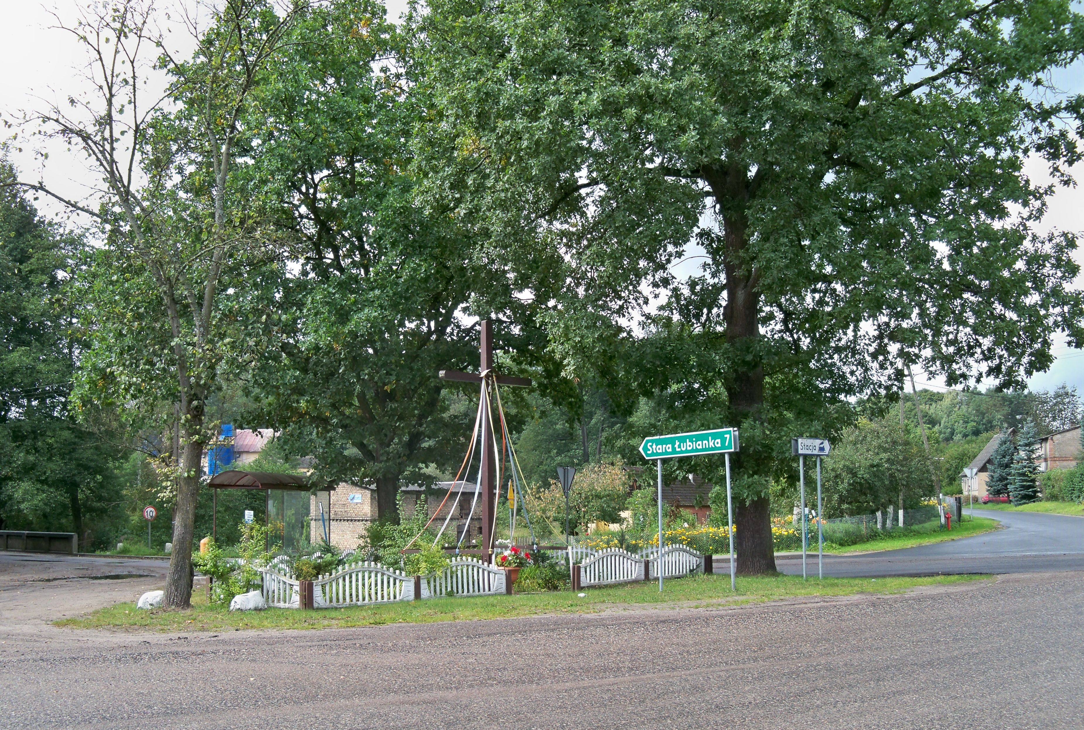 Krępsko k. Piły